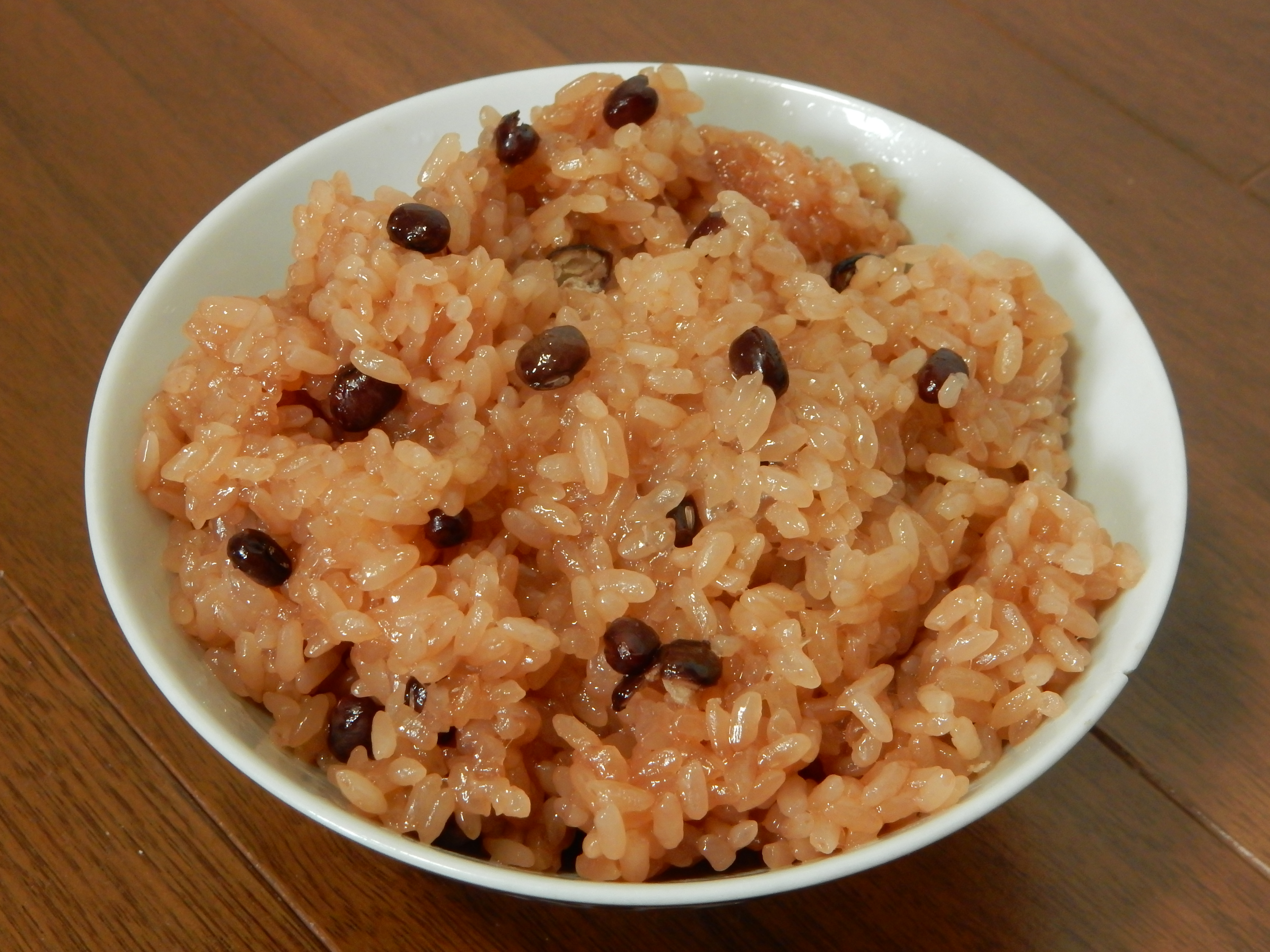 赤飯